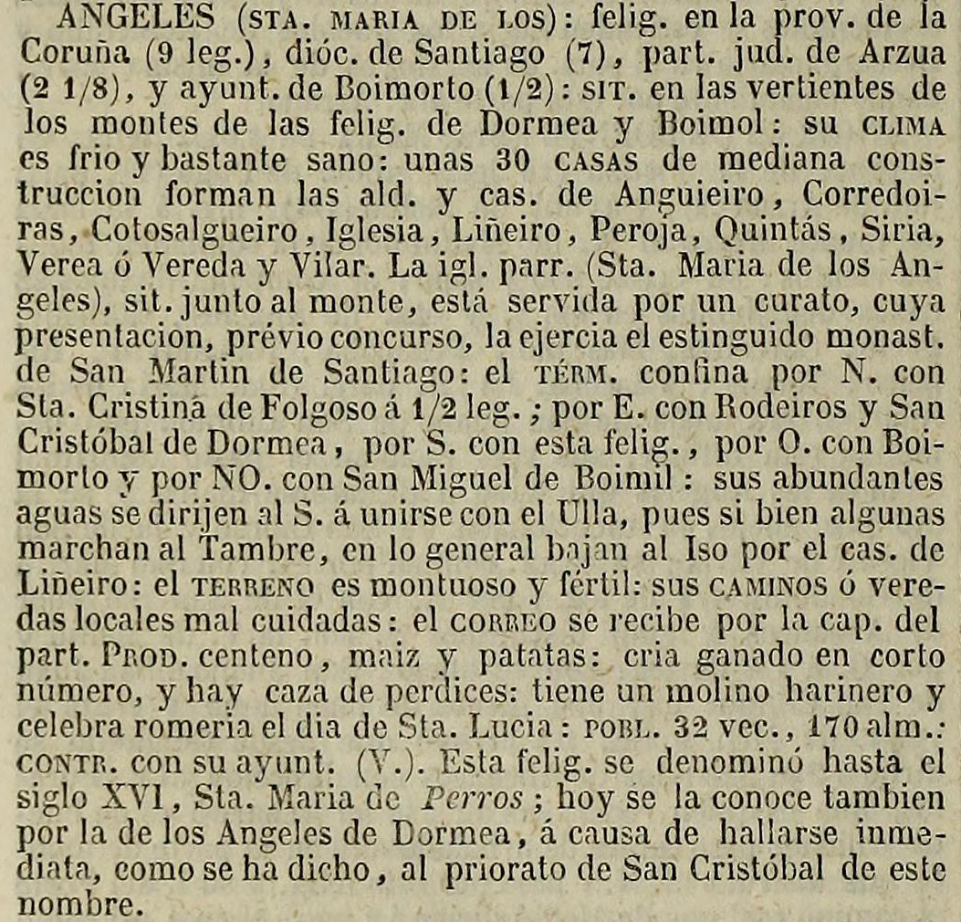 Os Ánxeles no Diccionario geográfico-estadístico-histórico de España y sus posesiones de Ultramar.